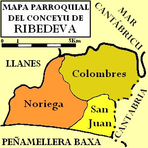 Mapa parroquial del conceyu de Ribedeva, dixebráu en colores.